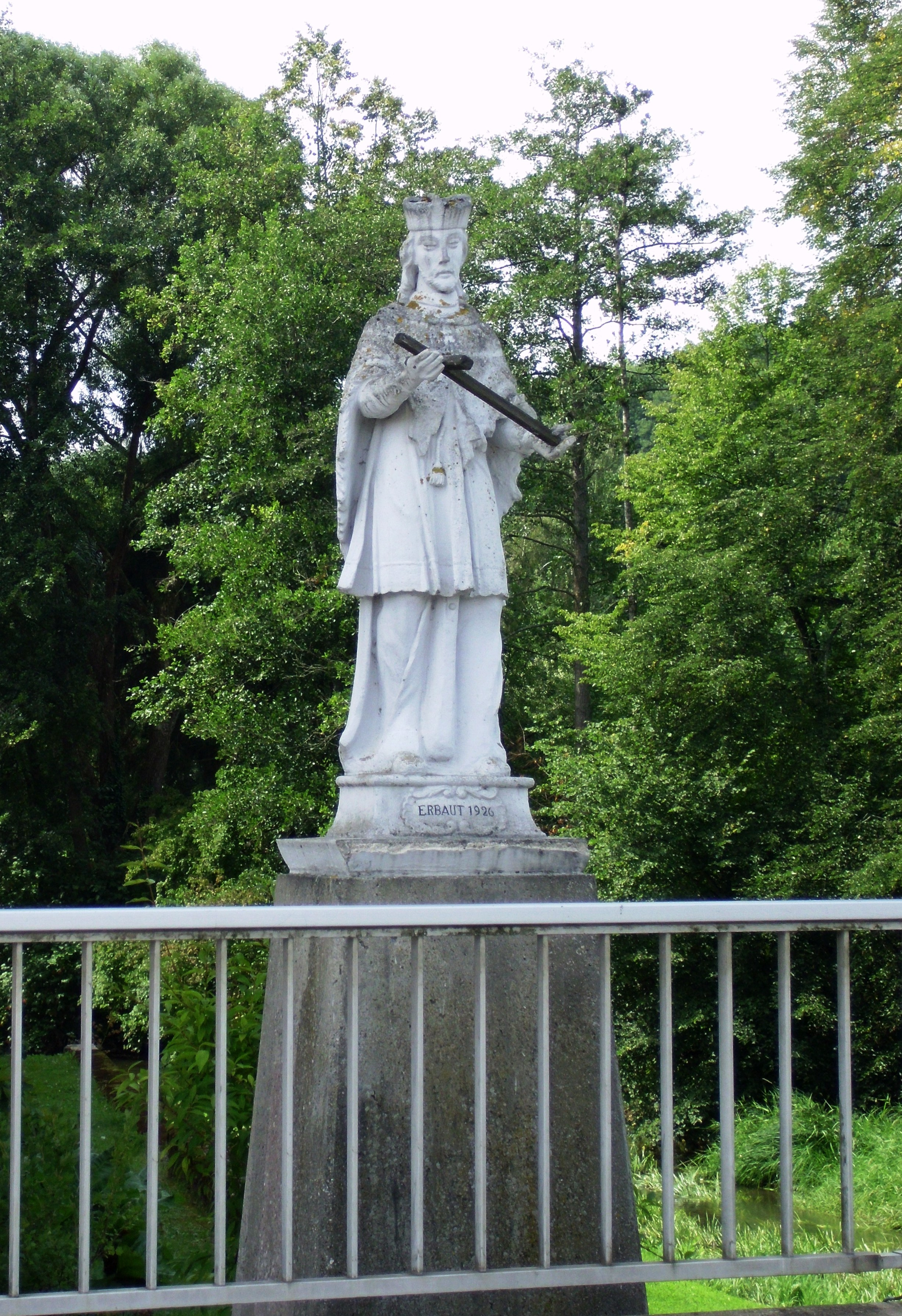 Obermässing, Gemeindeteil von Greding im mittelfränkischen Landkreis Roth, barocke Nepomuk-Statue an der Schwarzachbrücke